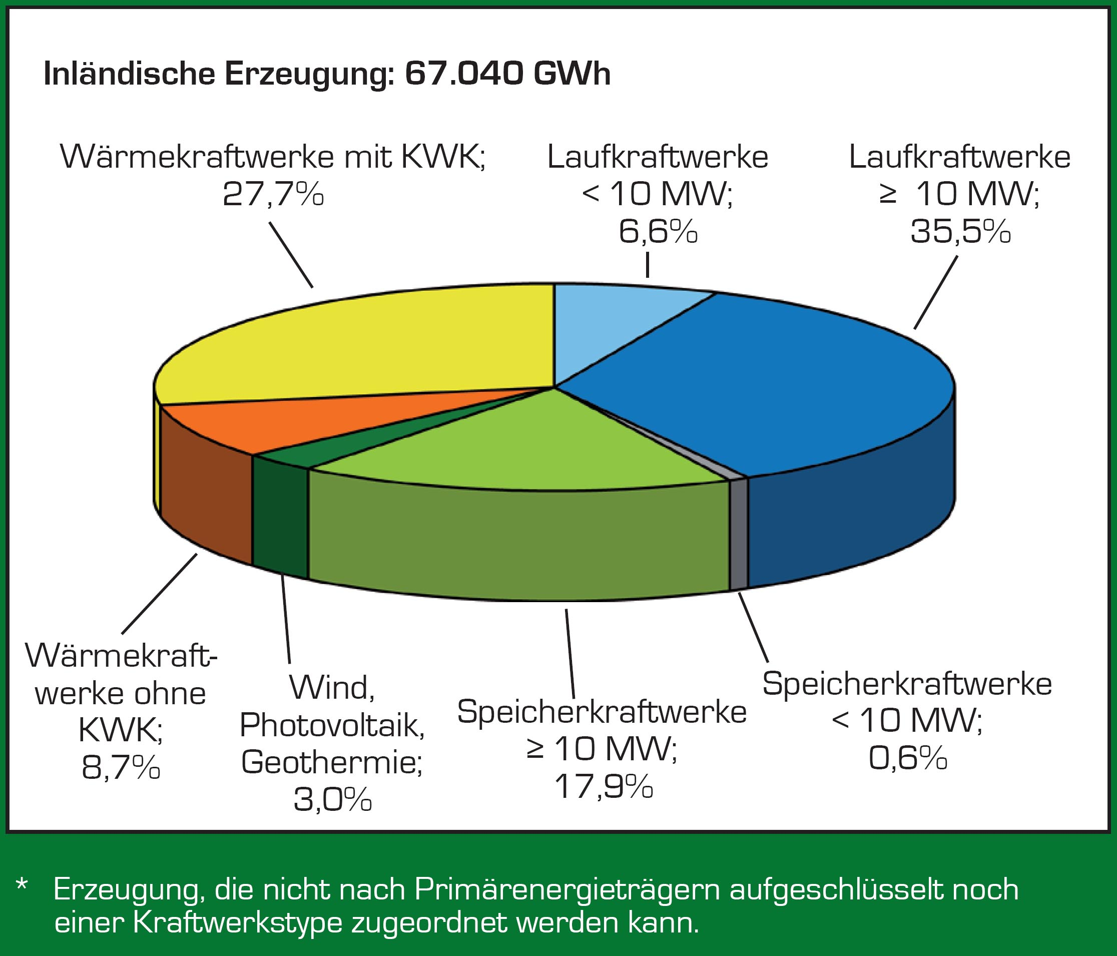 Österreichs Inlands-Stromerzeugungsstruktur im Jahr 2008